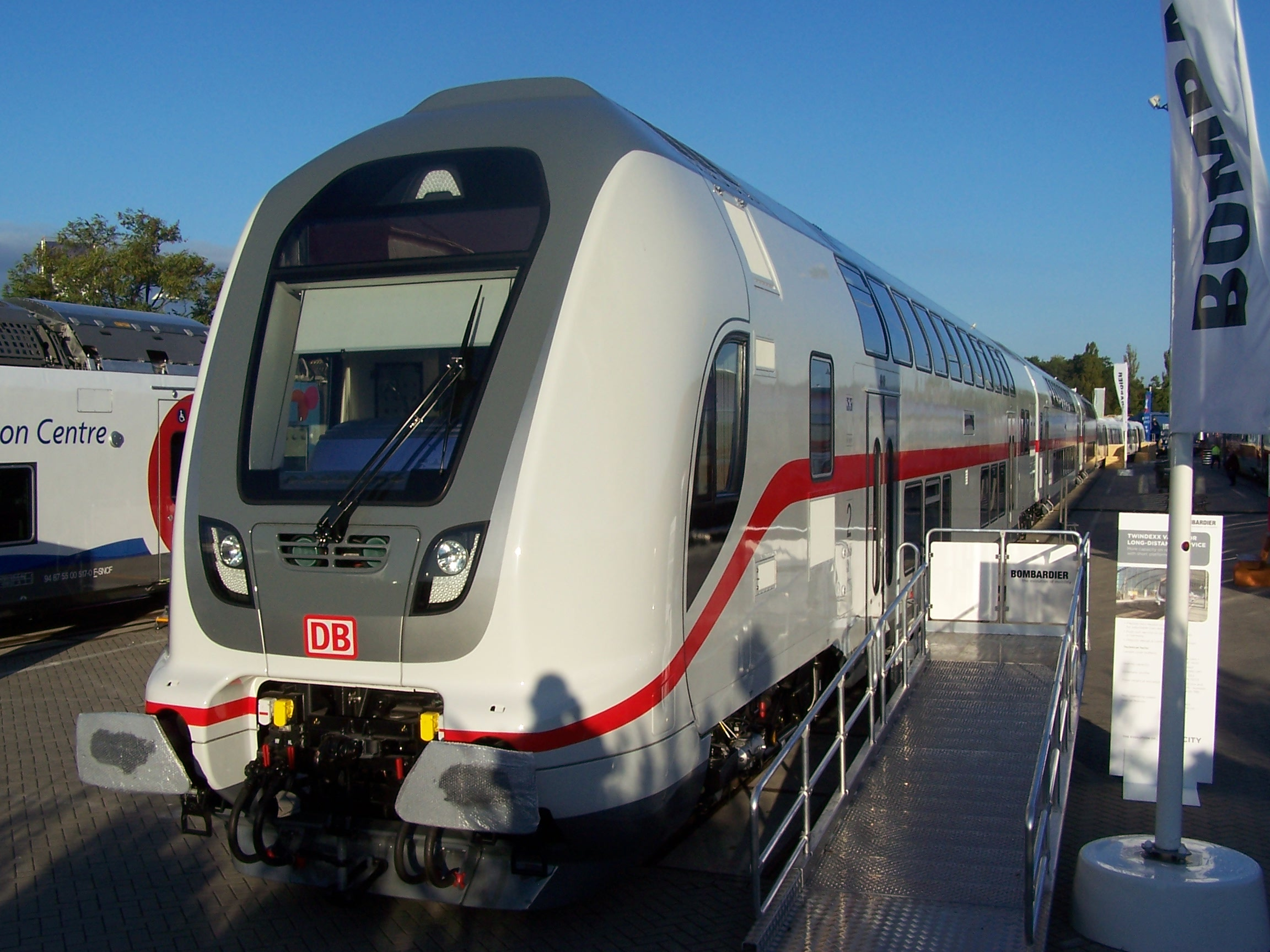 Bombardier IC Doppelstocksteuerwagen auf der Innotrans 2014.